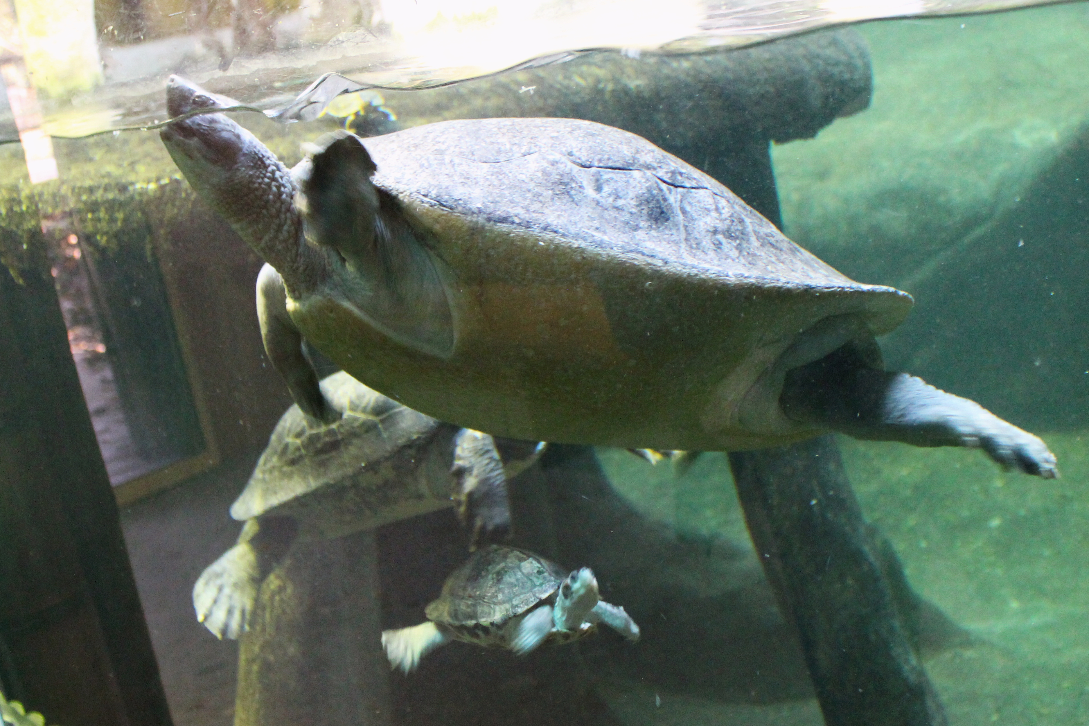 Project: Fotíme Česko